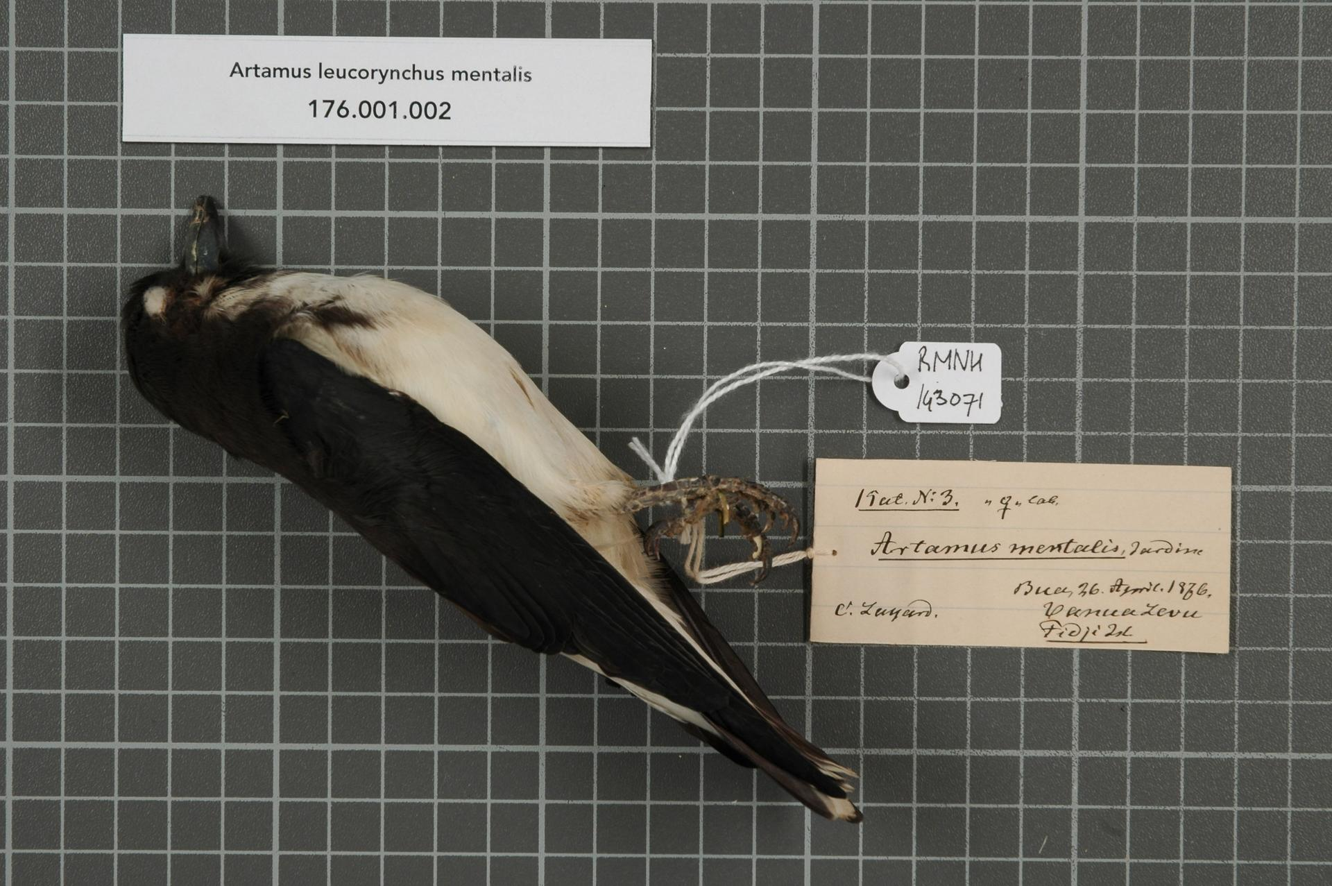 Artamus leucorhynchus mentalis Jardine, 1845